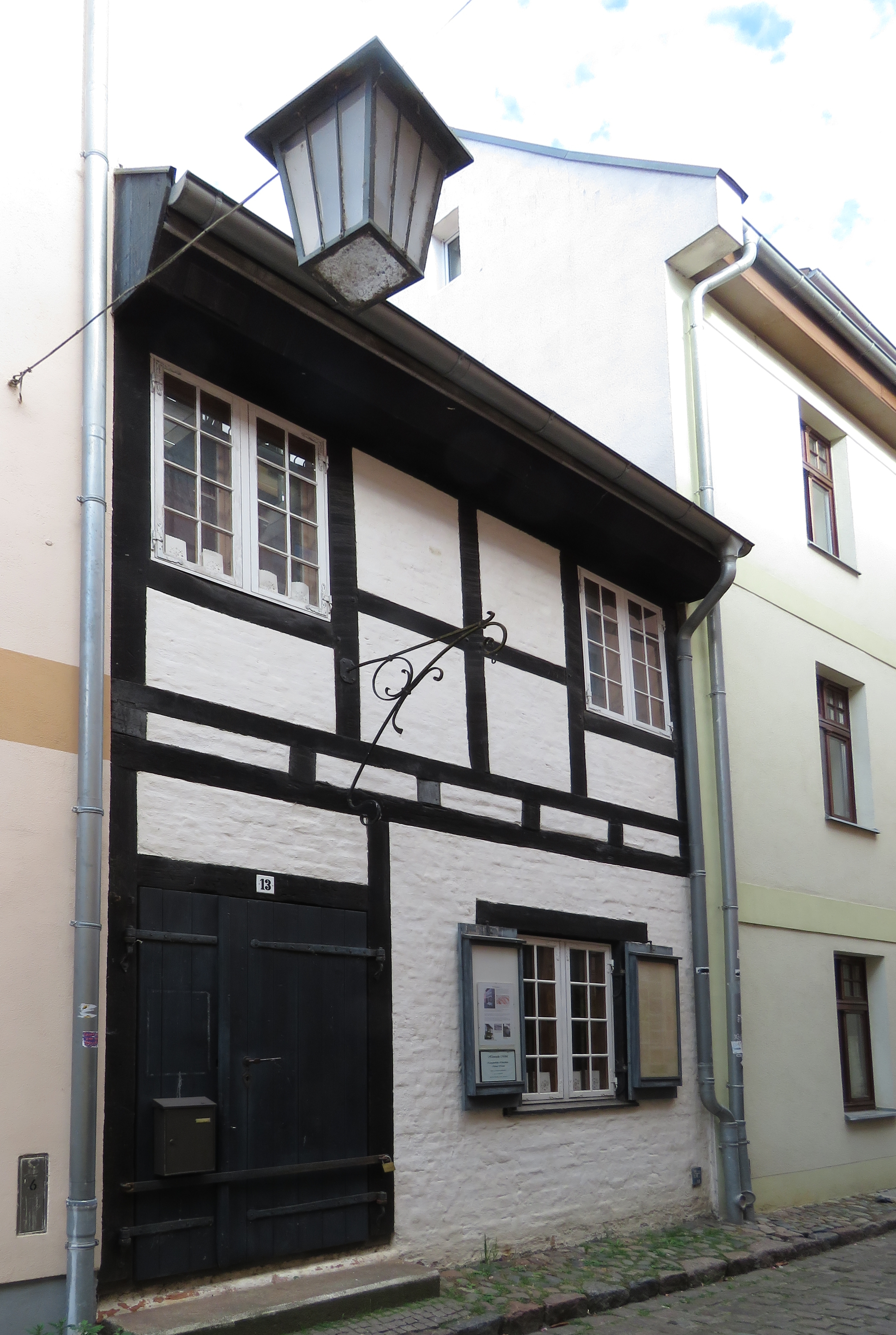 Baudenkmal Haus Badstüberstraße 13 in Stralsund